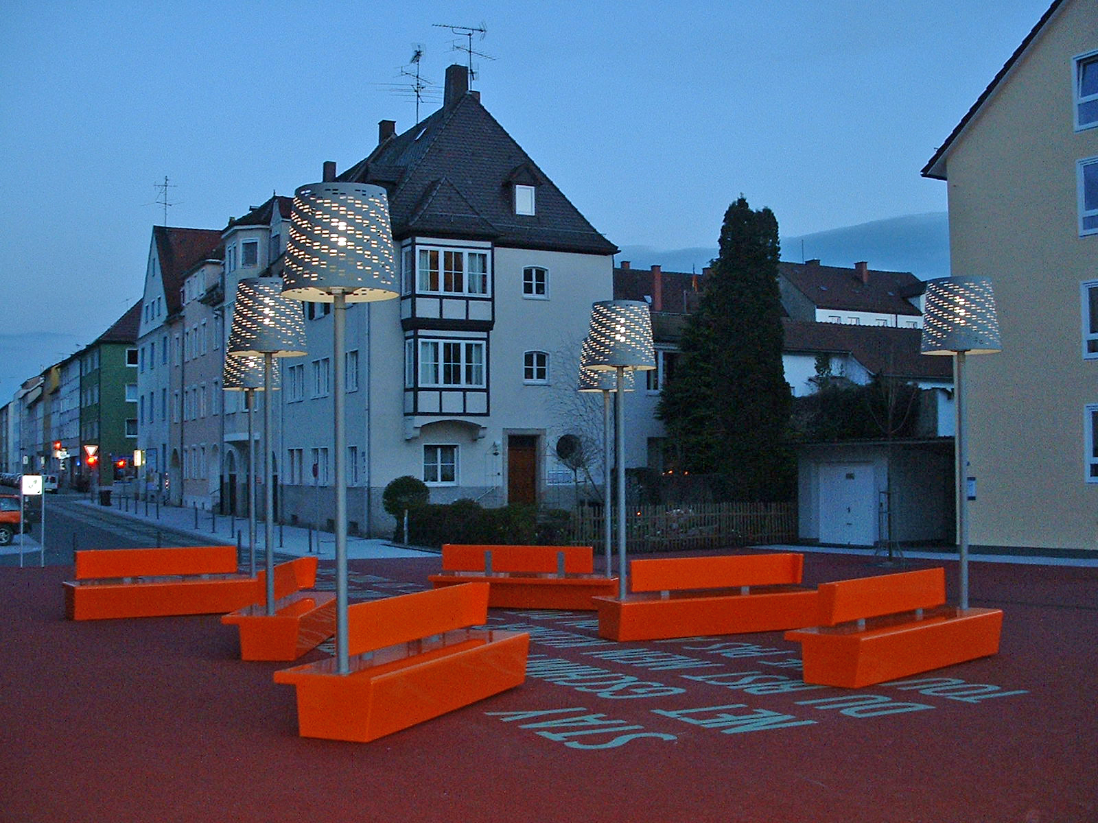 Der am 13. April 2008 der Öffentlichkeit übergebene "Kunst"-Maxplatz in Neu-Ulm